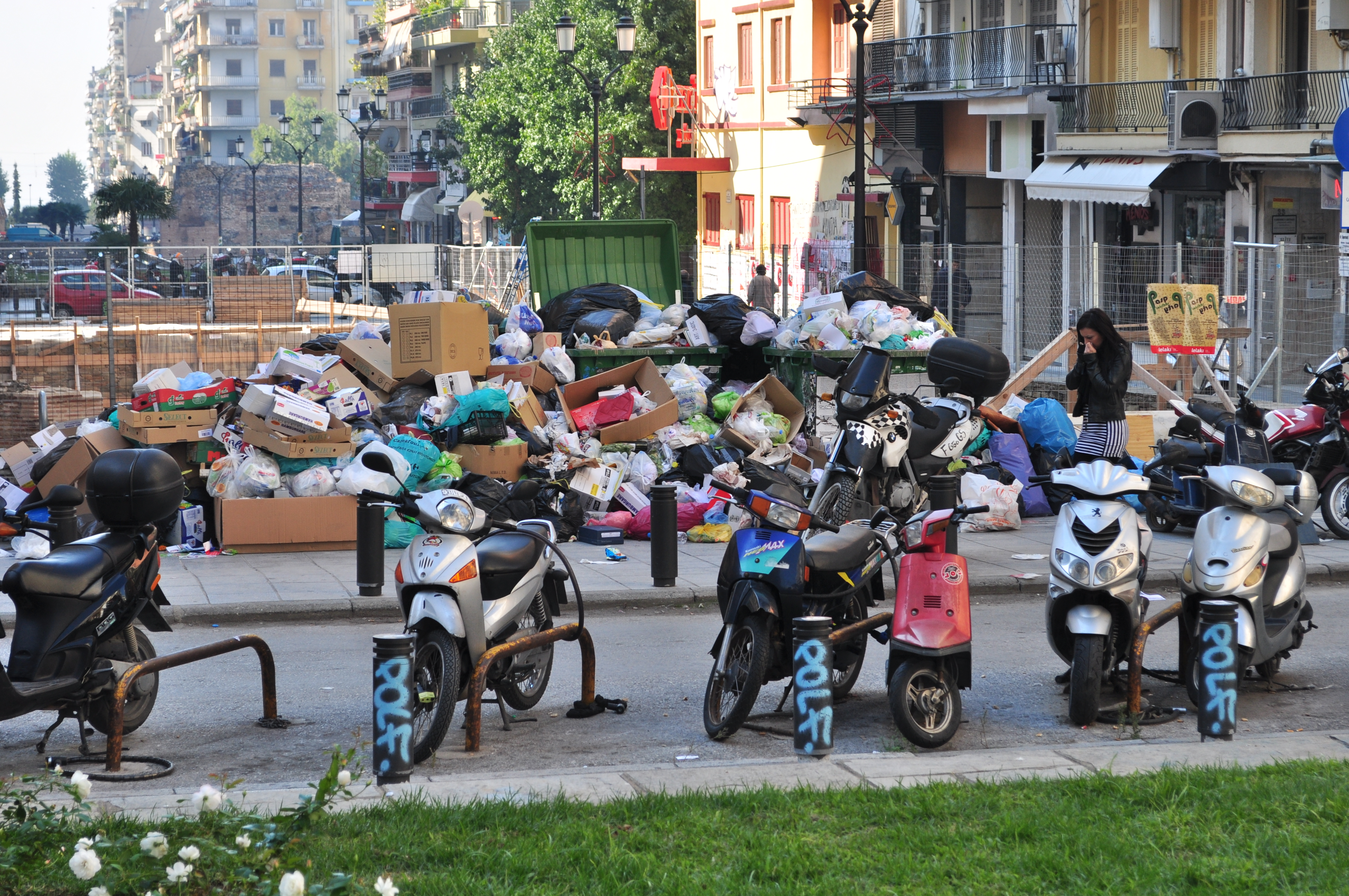 Resultat af en af de hyppige strejker blandt renovationarbejderne i Thessaloniki